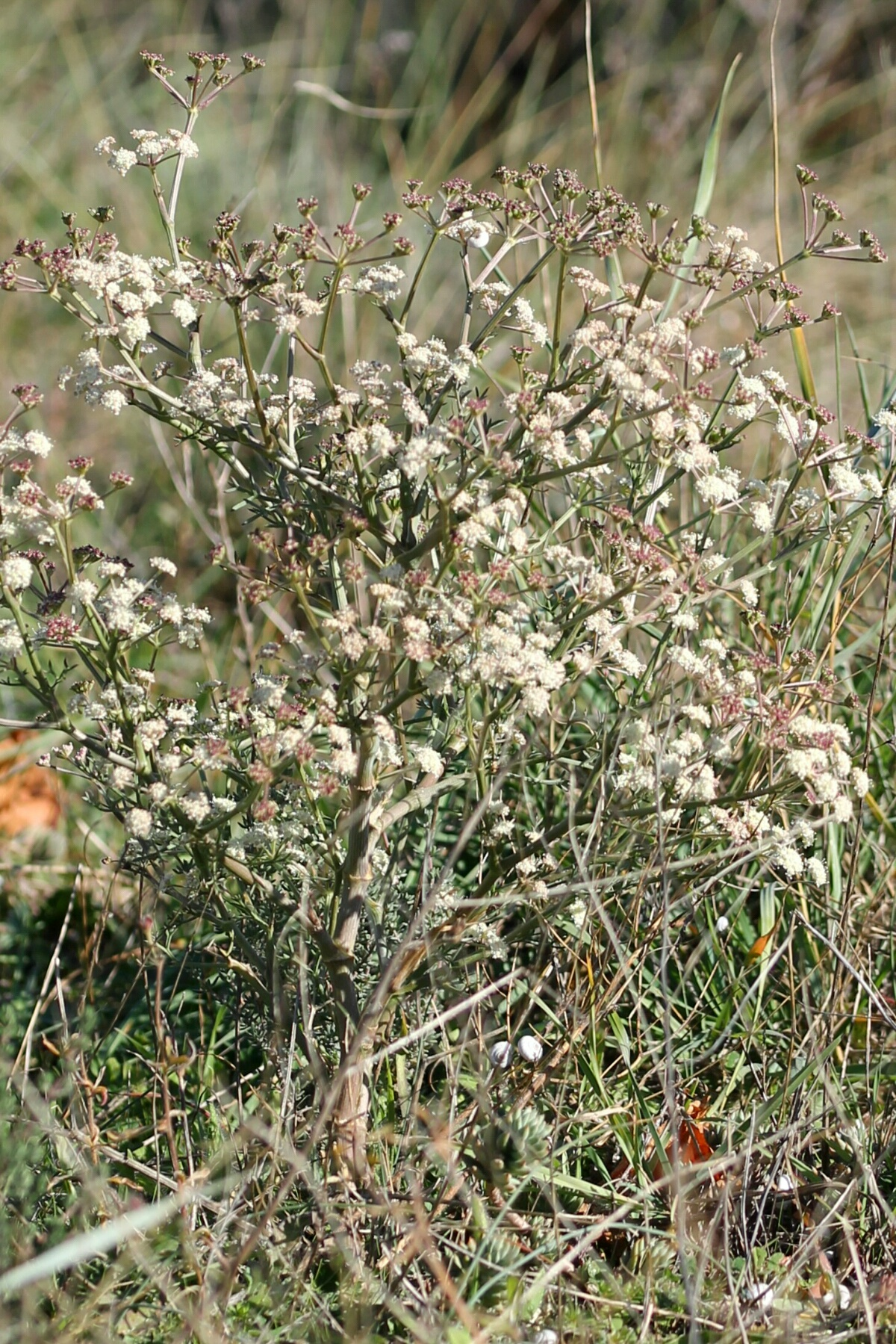 Seseli tortuosum L.